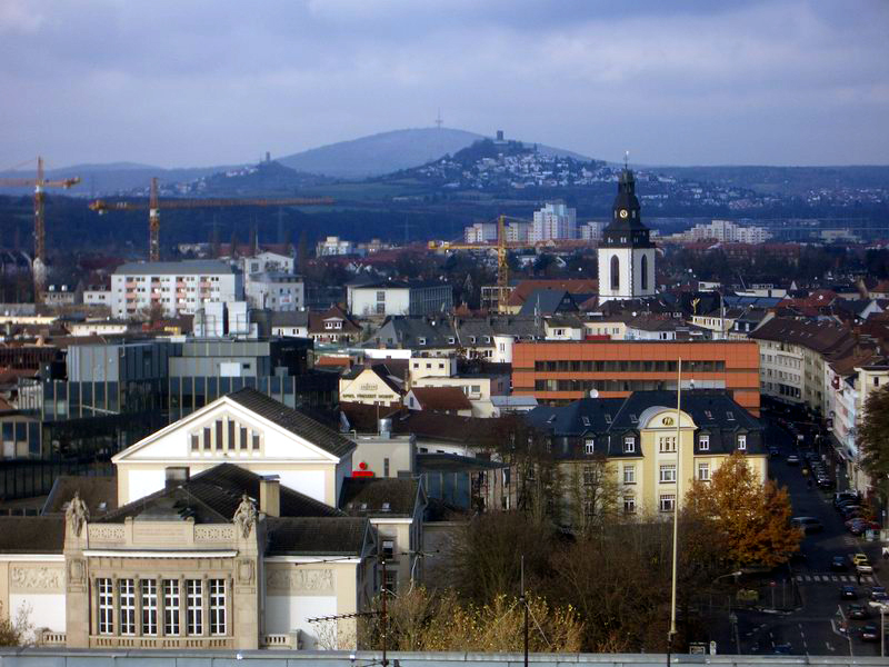 Blick auf die Innenstadt von Gießen. Links vorne das Stadttheater, in der Bildmitte der Stadtkirchturm, im Hintergrund die Burgen Vetzberg (links) und Gleiberg (rechts), zwischen ihnen der Dünsberg.